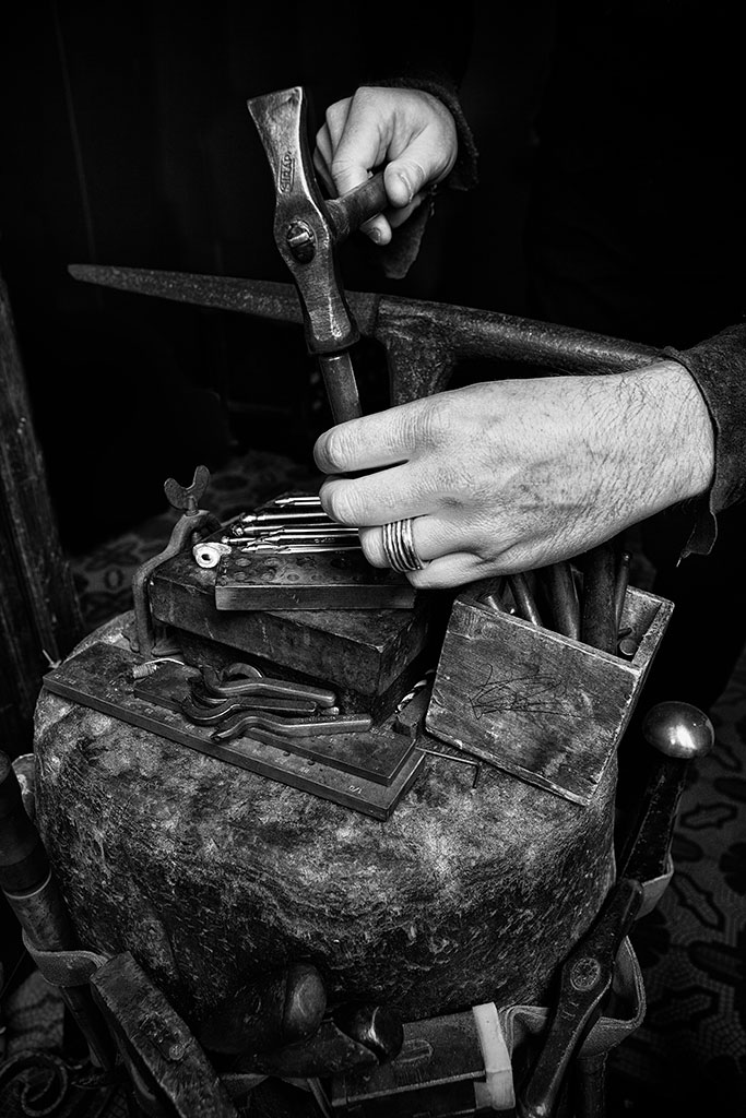 Goldschmied